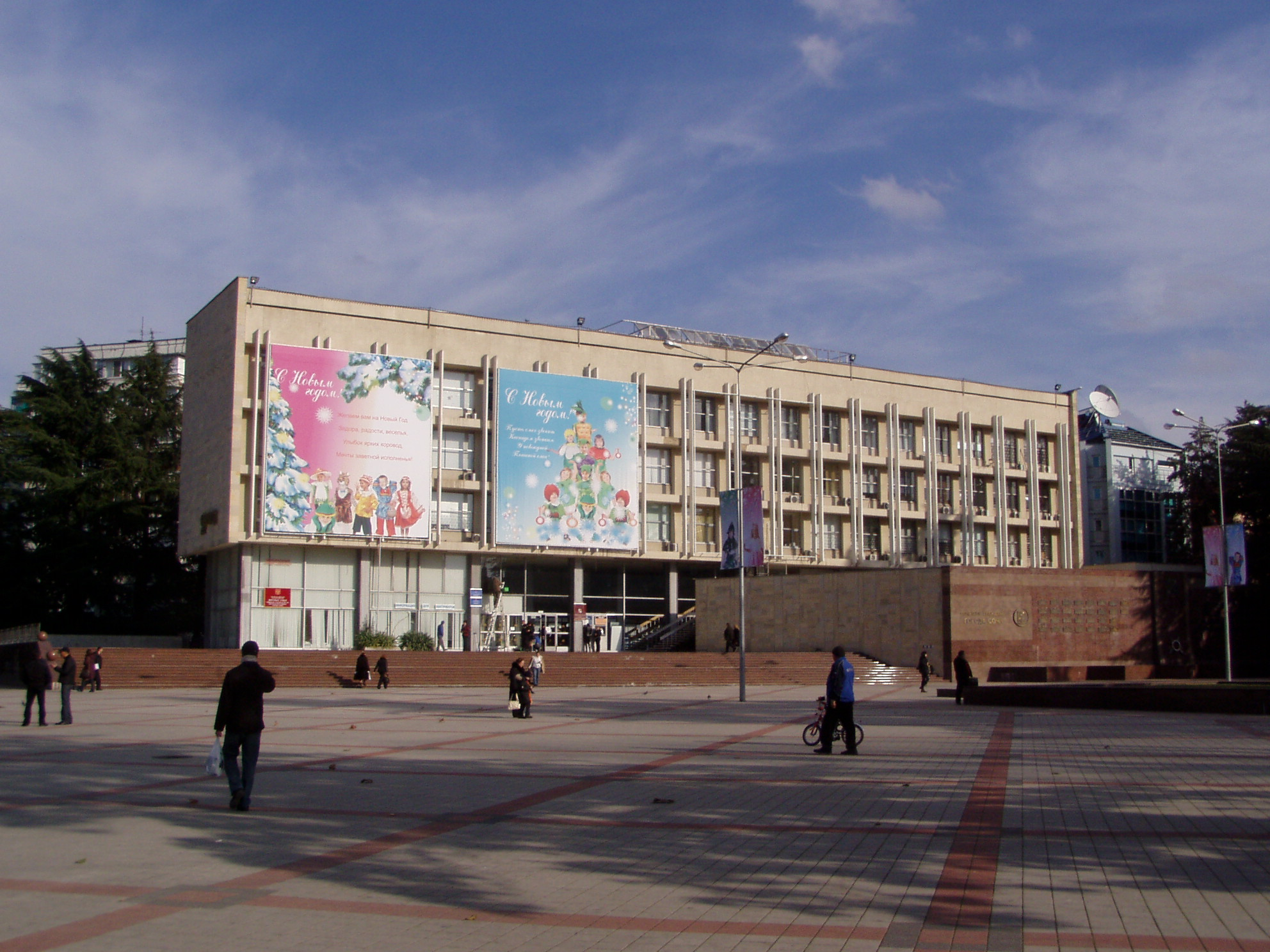 Сочинский государственный университет туризма и курортного дела (СГУТиКД)